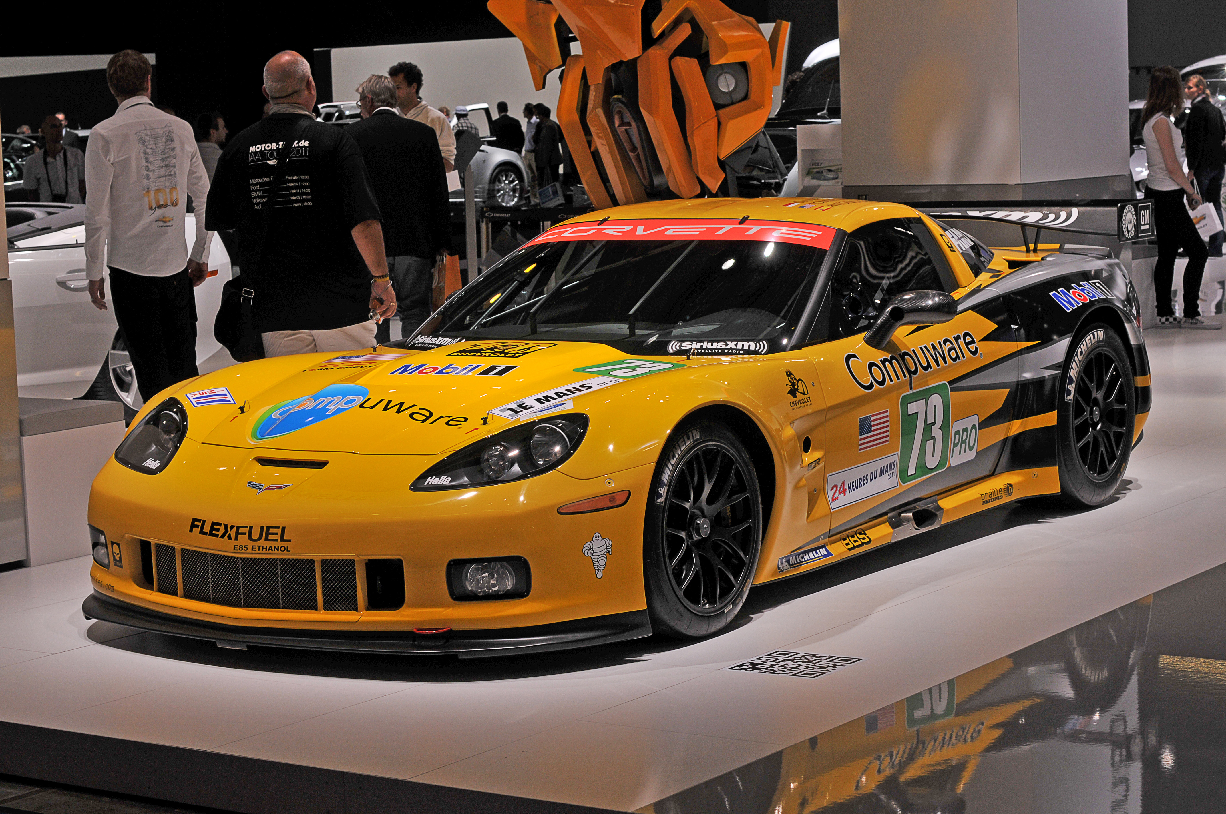 IAA 2011; Chevrolet Corvette C6.R (GT2)